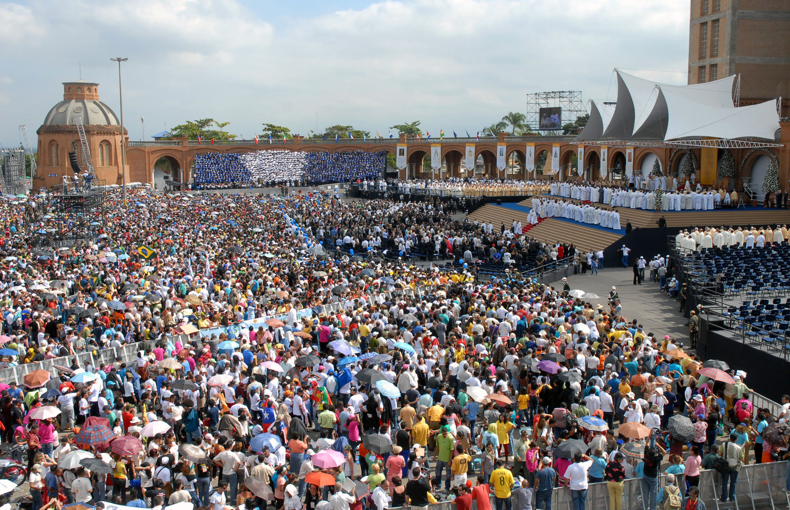 Papa Bento XVI durante missa na Basílica de Nossa Senhora Aparecida, no interior do estado de São Paulo, Brasil.